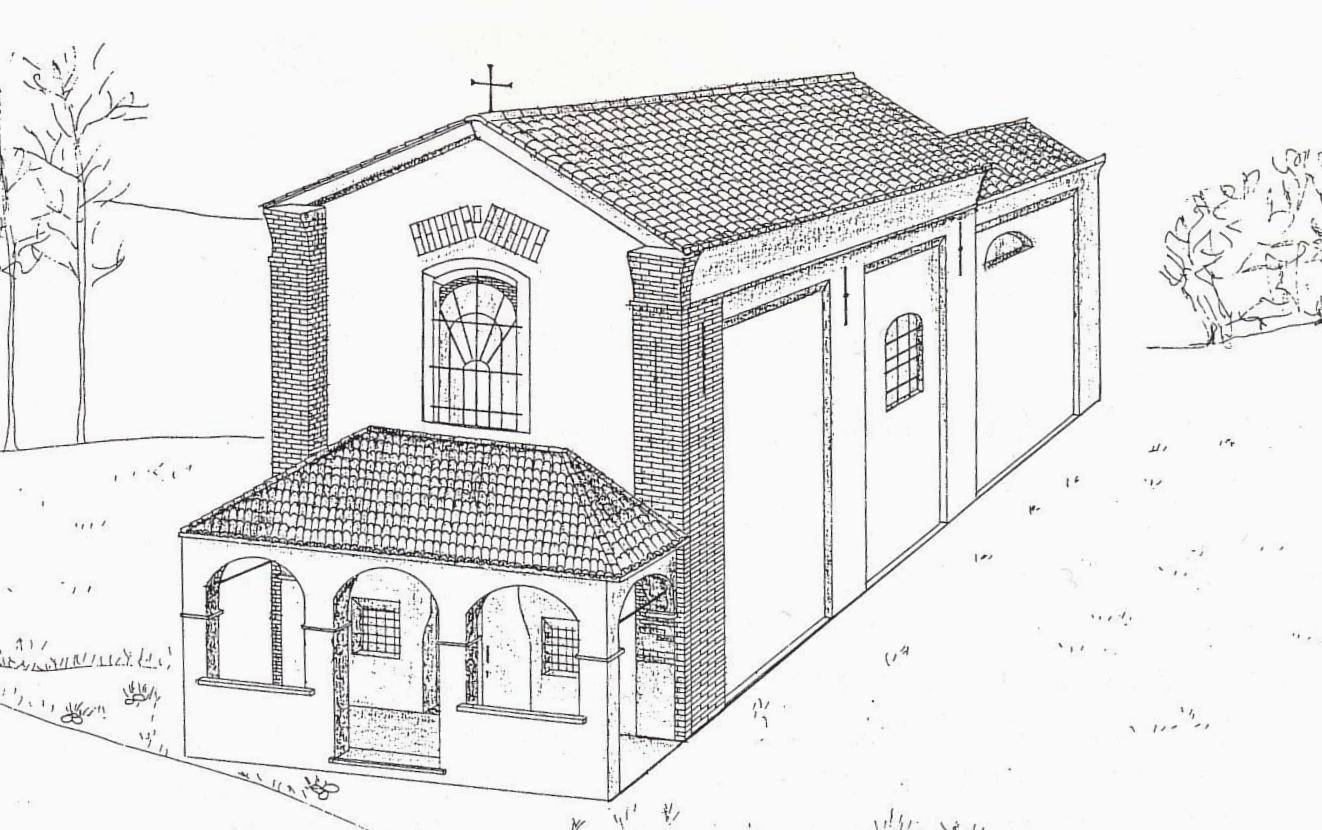 Fara Novarese (NO), Chiesa della Beata Vergine Addolorata o Madonna dei Campi, ipotesi ricostruttiva.